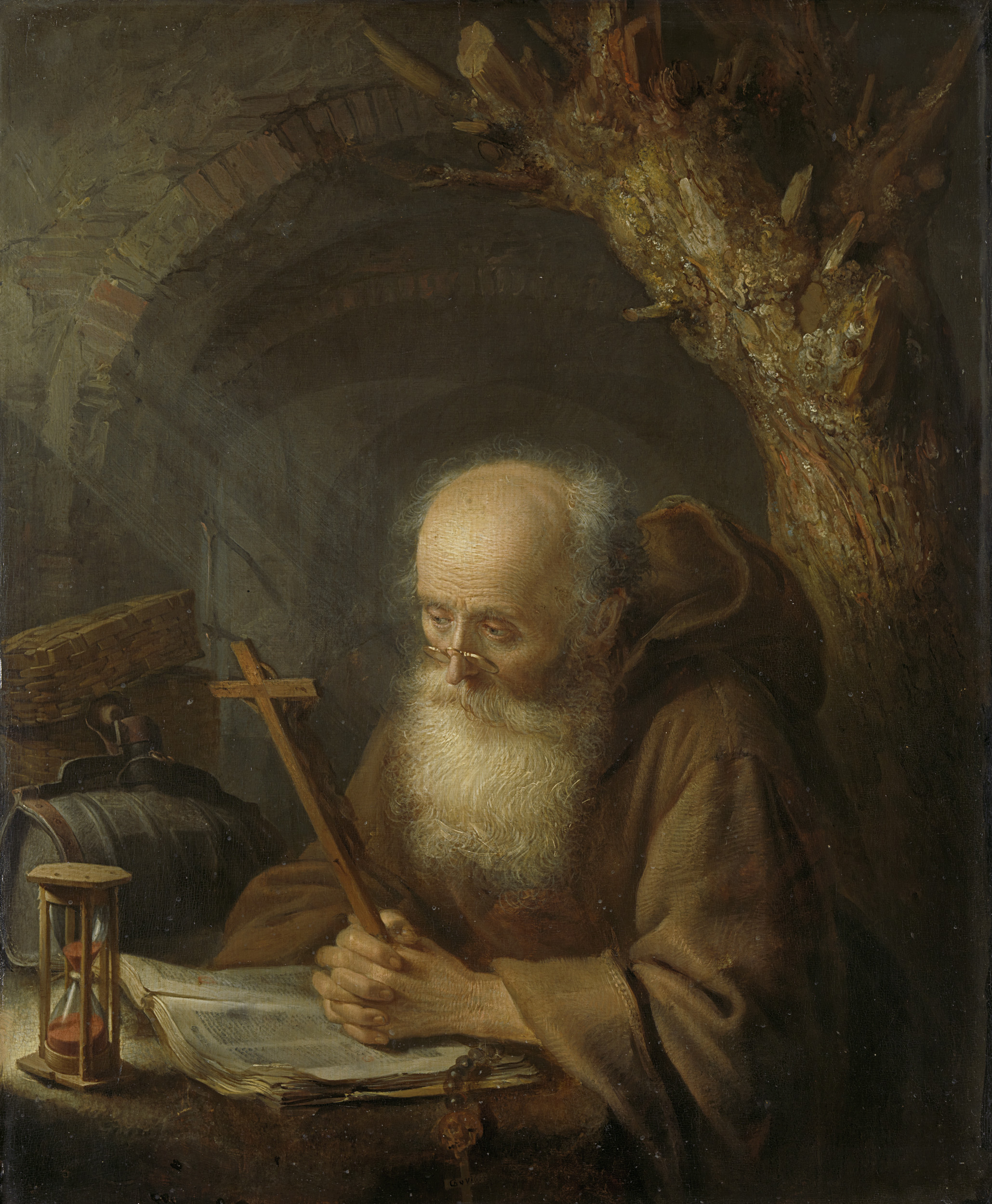 Een kluizenaar. Oude man met een bril mediterend met een kruisbeeld. Op een tafel liggen een opengeslagen boek, rozenkrans en zandloper.